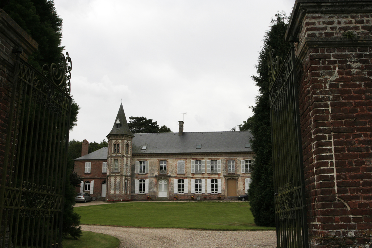 Buire-le-Sec château de Romont